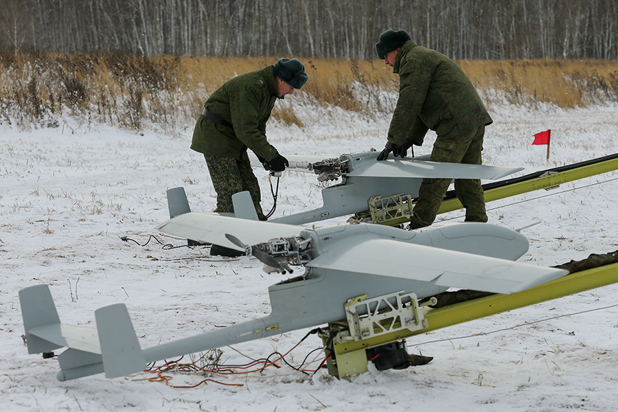 Подготовка специалистов в Межвидовом учебном центре беспилотных летательных аппаратов